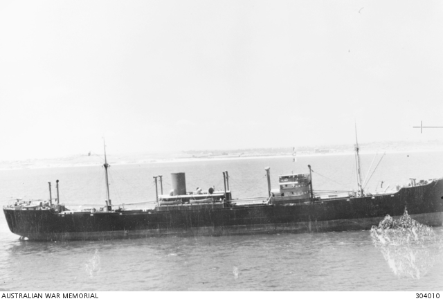 Das in Schweden gebaute Motorschiff Talabot der norwegischen Reederei Wilhelmsen